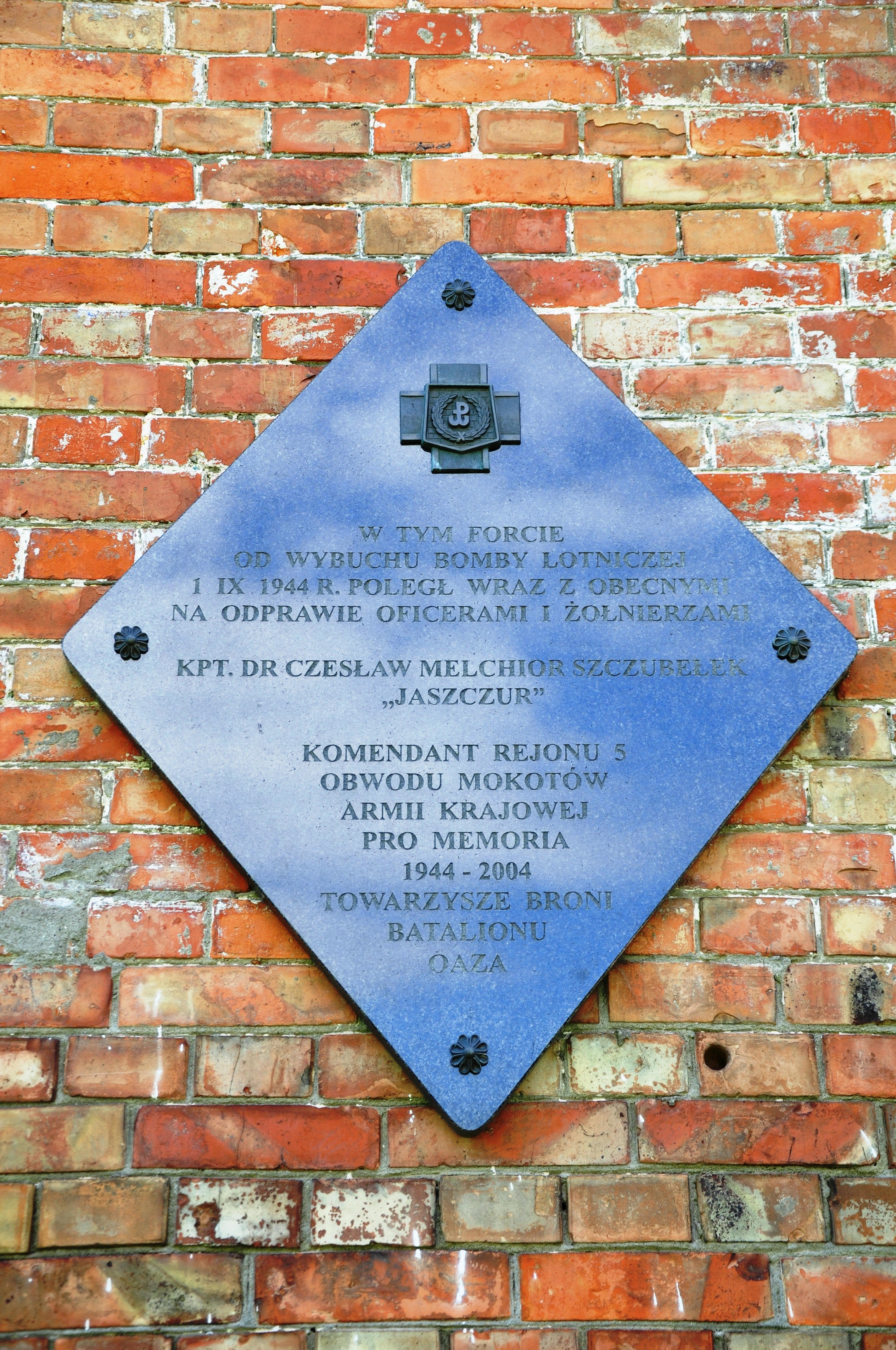 Fort IX Warschau